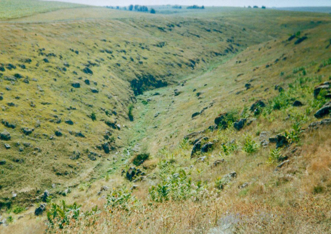 Gorge near Ţipova, raionul Rezina, Moldova.